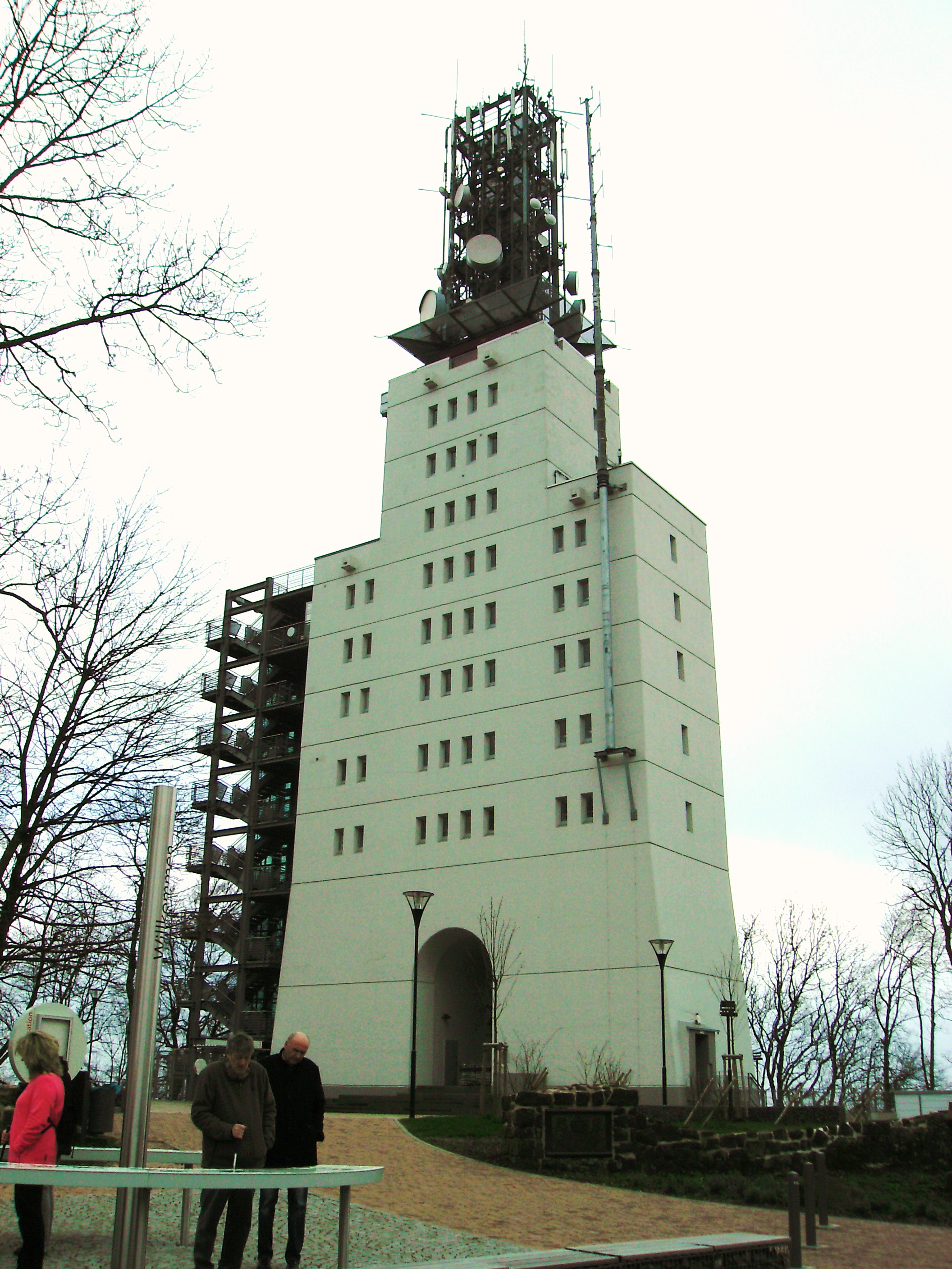 Schaumbergturm nach seiner umfassenden Renovierung (2014)